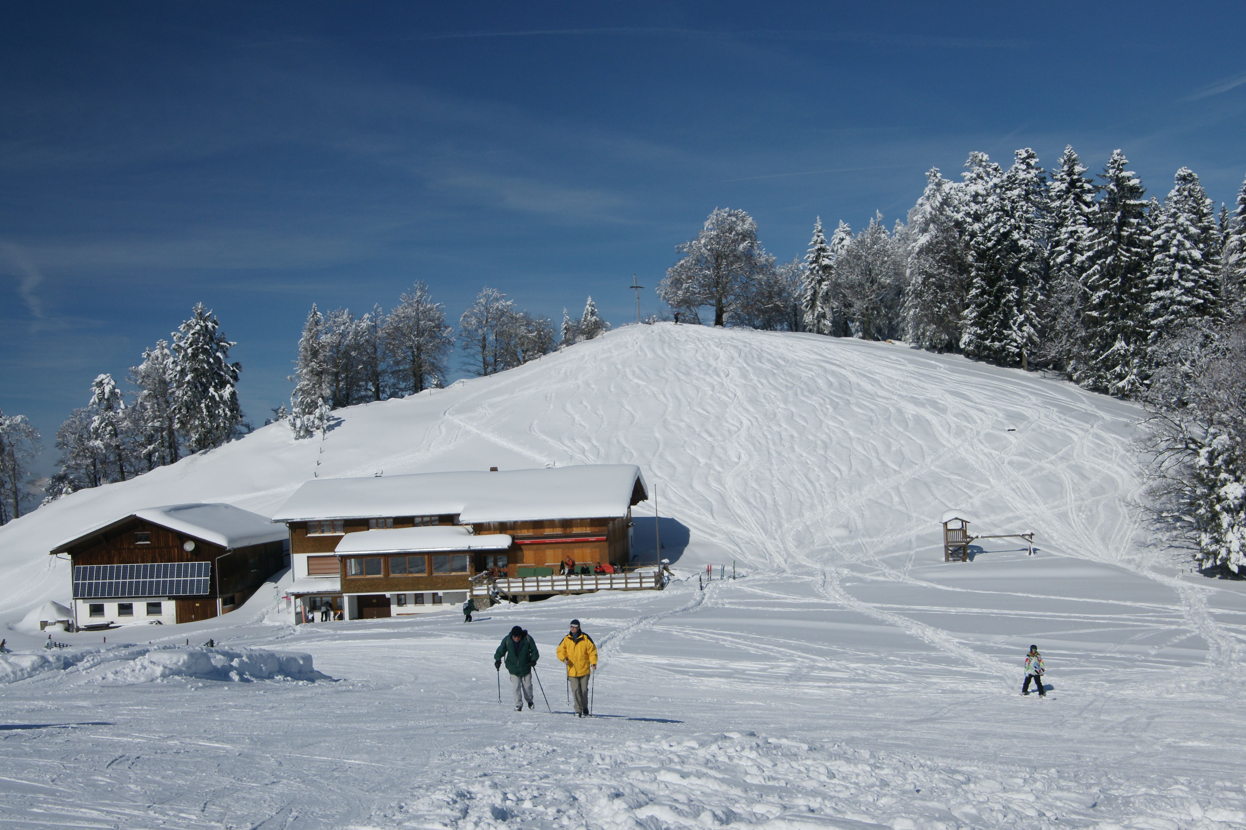 Der Brüggelekopf. Blick von der gleichnamigen Sesselbahn - Bergstation, die von Alberschwende hochführt.